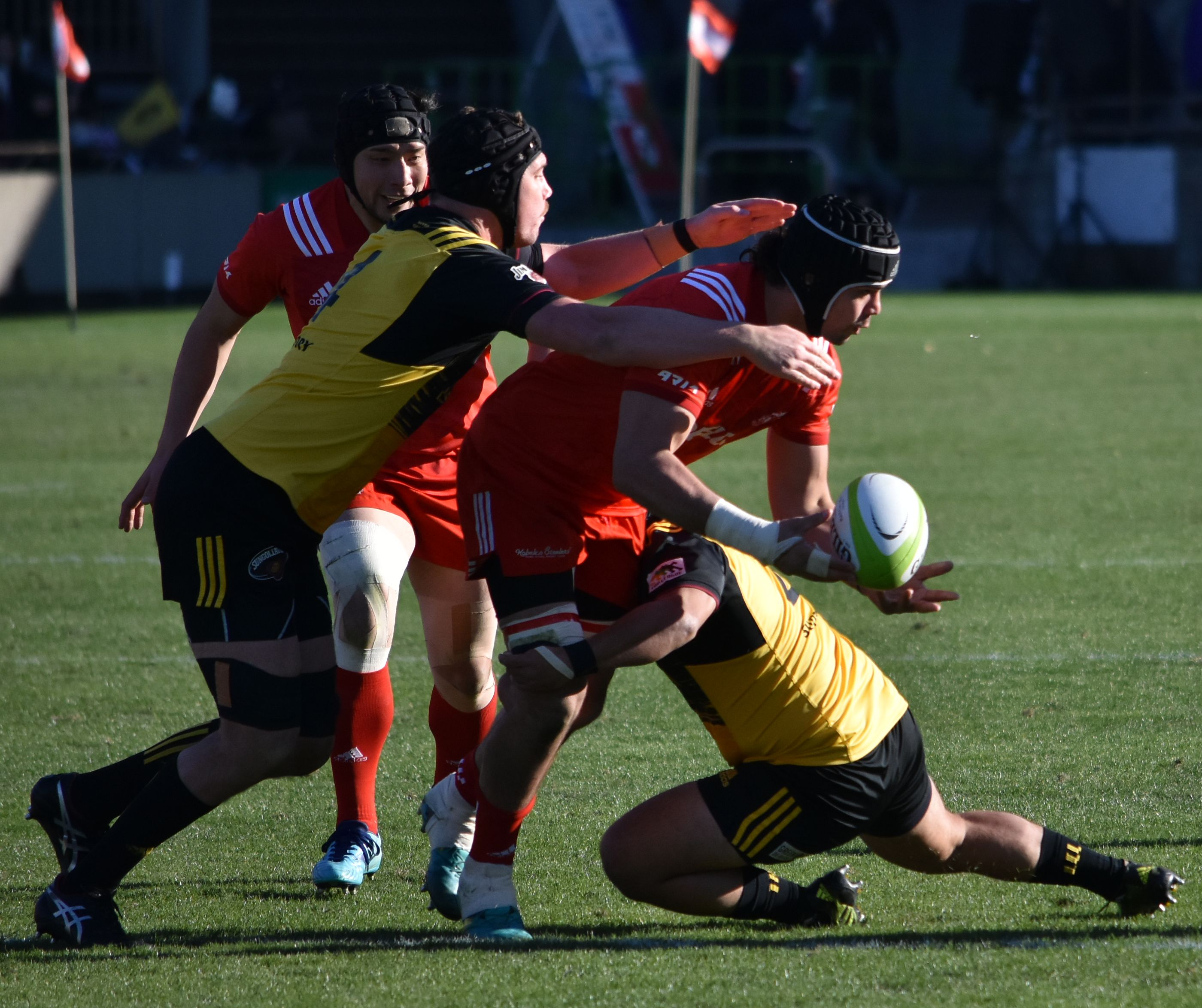 トム・フランクリン